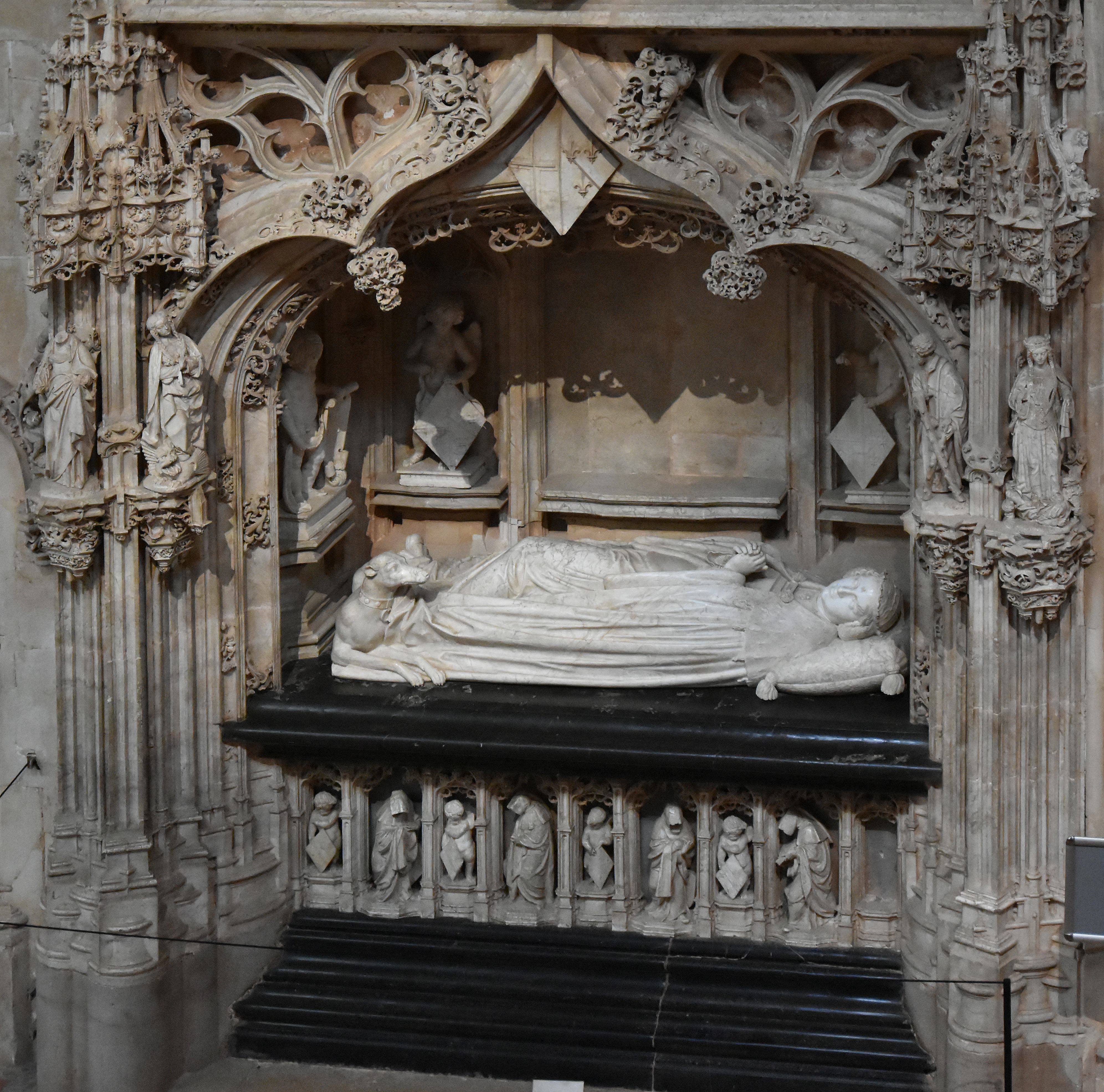 Grafmonument Margaretha van Bourbon (1438-1483) - Koninklijk klooster van Brou